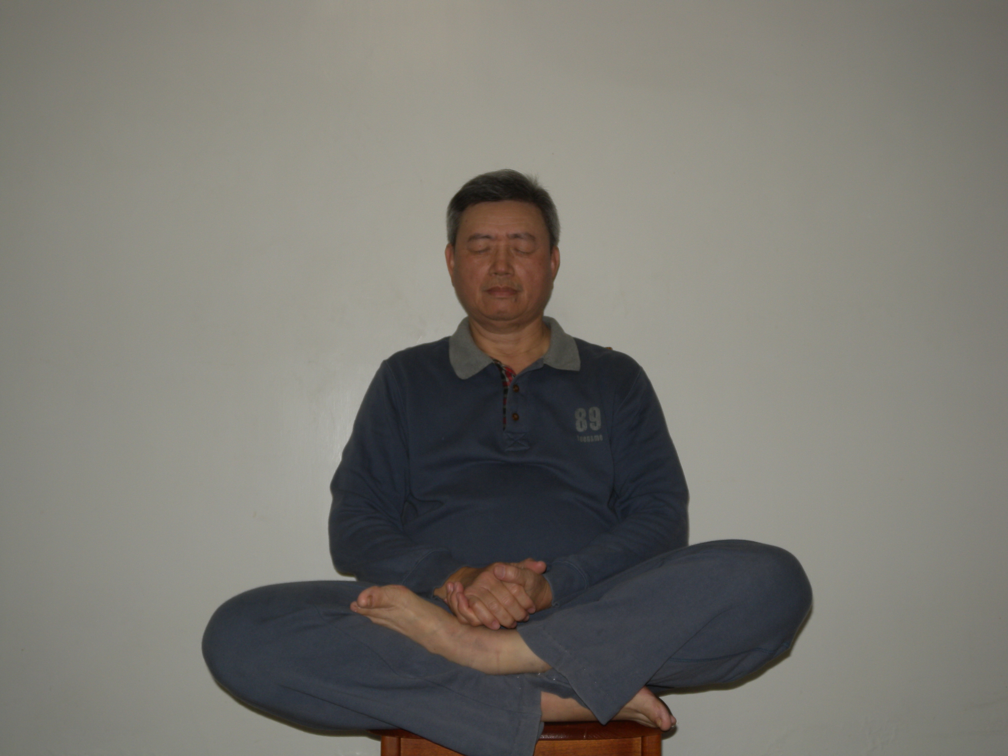 鄧豐洲內丹術打坐 (Deng Feng-Zhou exercises Neidan.)